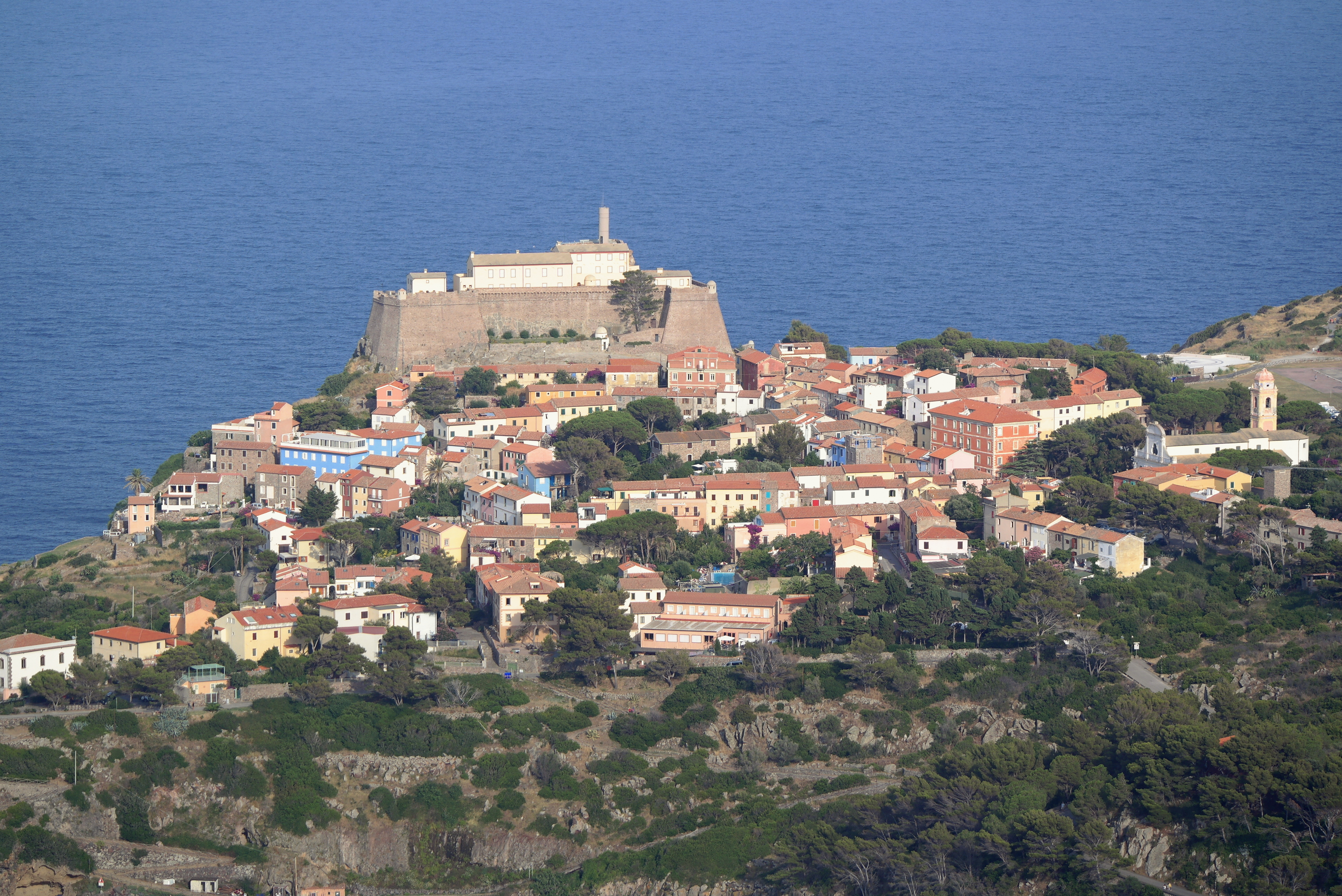 veduta del paese di Capraia Isola dall'interno